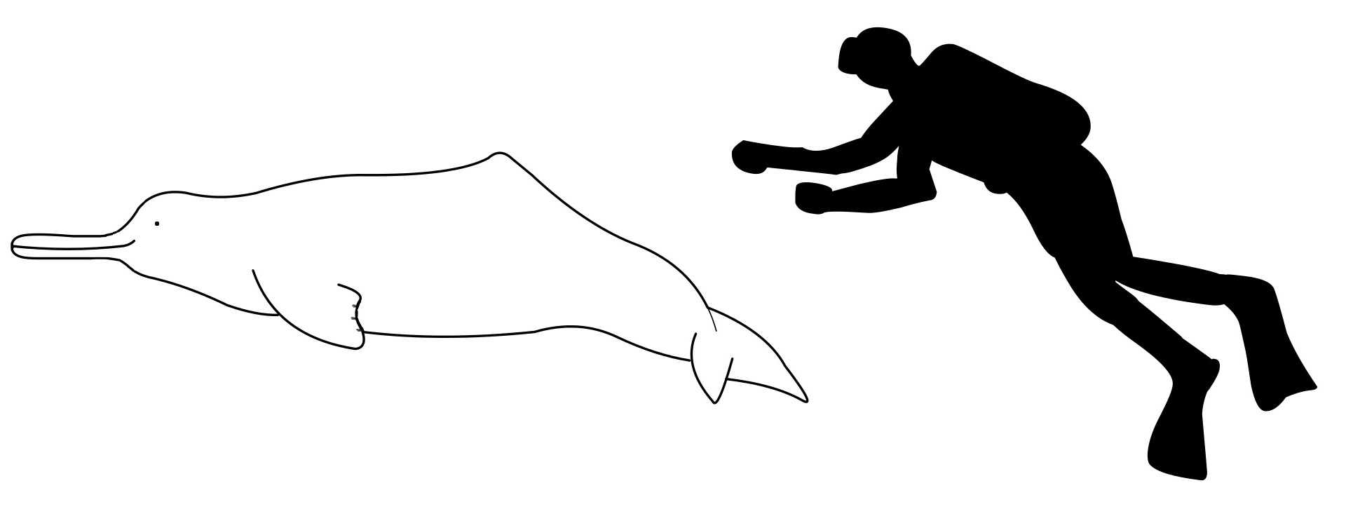 Modification du bec et de l’œil.